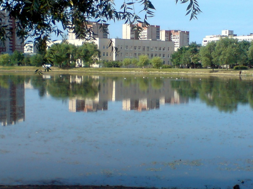 Пруд в саду Ивана Фомина (фото 2011 года). Трёхэтажное здание на заднем плане — это Детская школа искусств им. Г. В. Свиридова